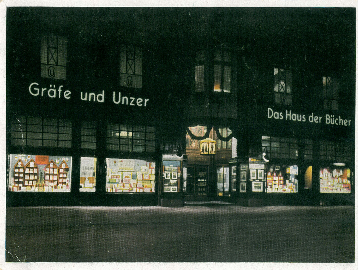 Weihnachtsdekoration von Gräfe und Unzer in Königsberg, Ostpreußen, Großdeutsches Reich.